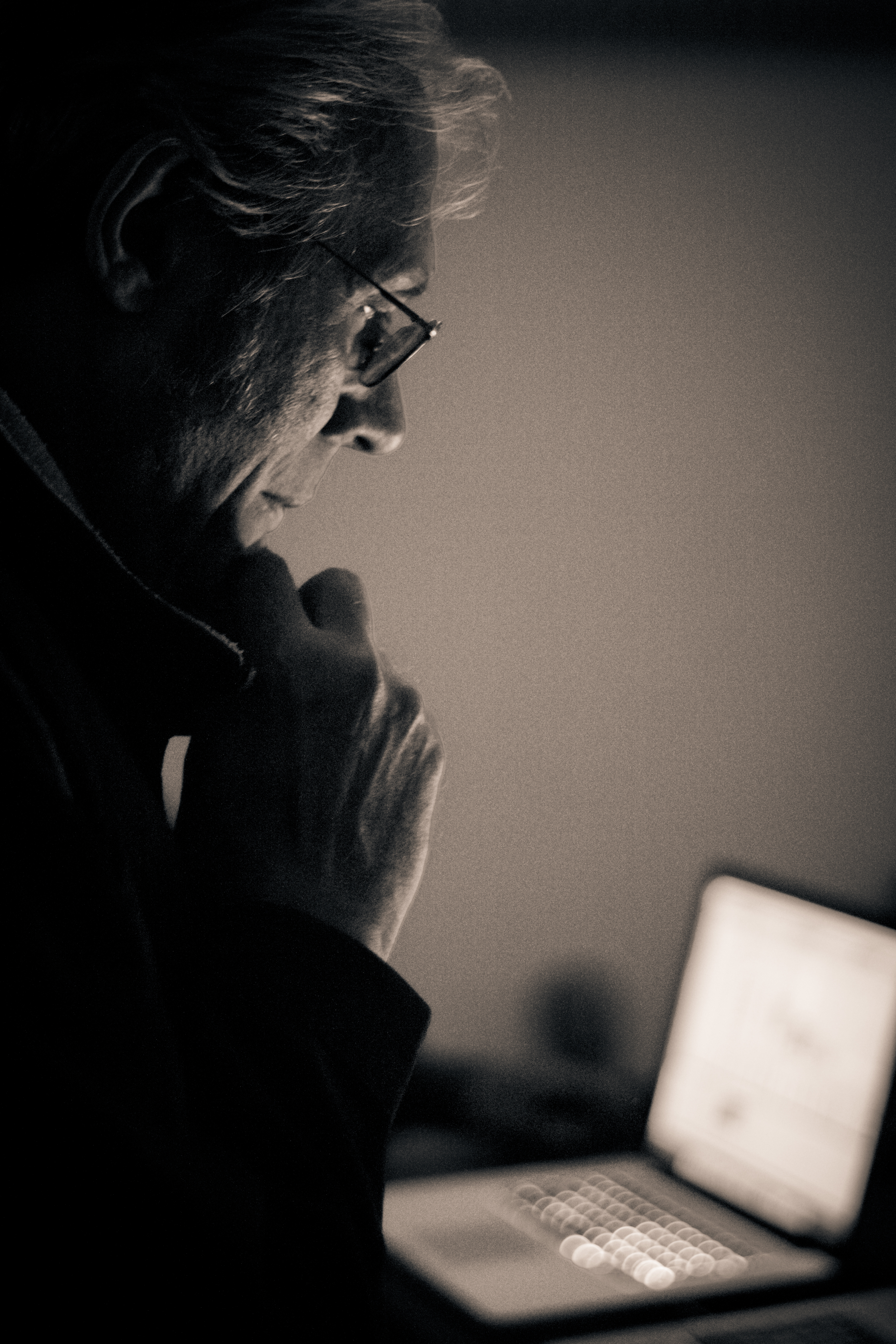 Luca Spagnoletti